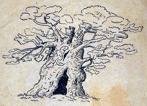 Zeichnung von der Femeiche bei Erle